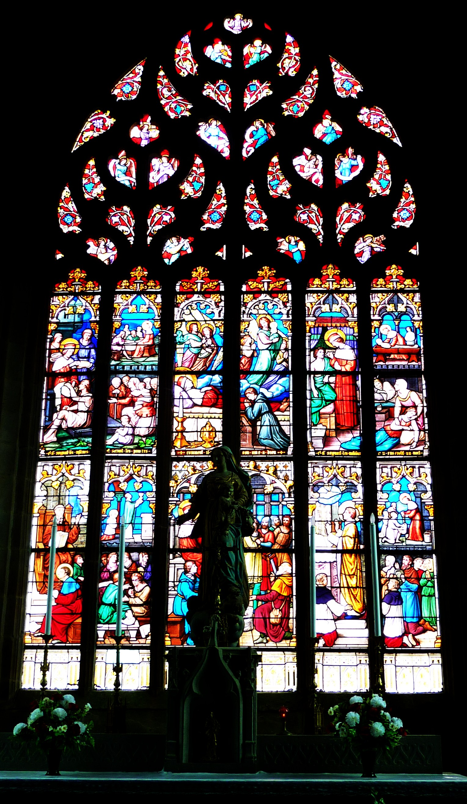 Plougonven: église paroissiale, vitrail derrière le maître-autel